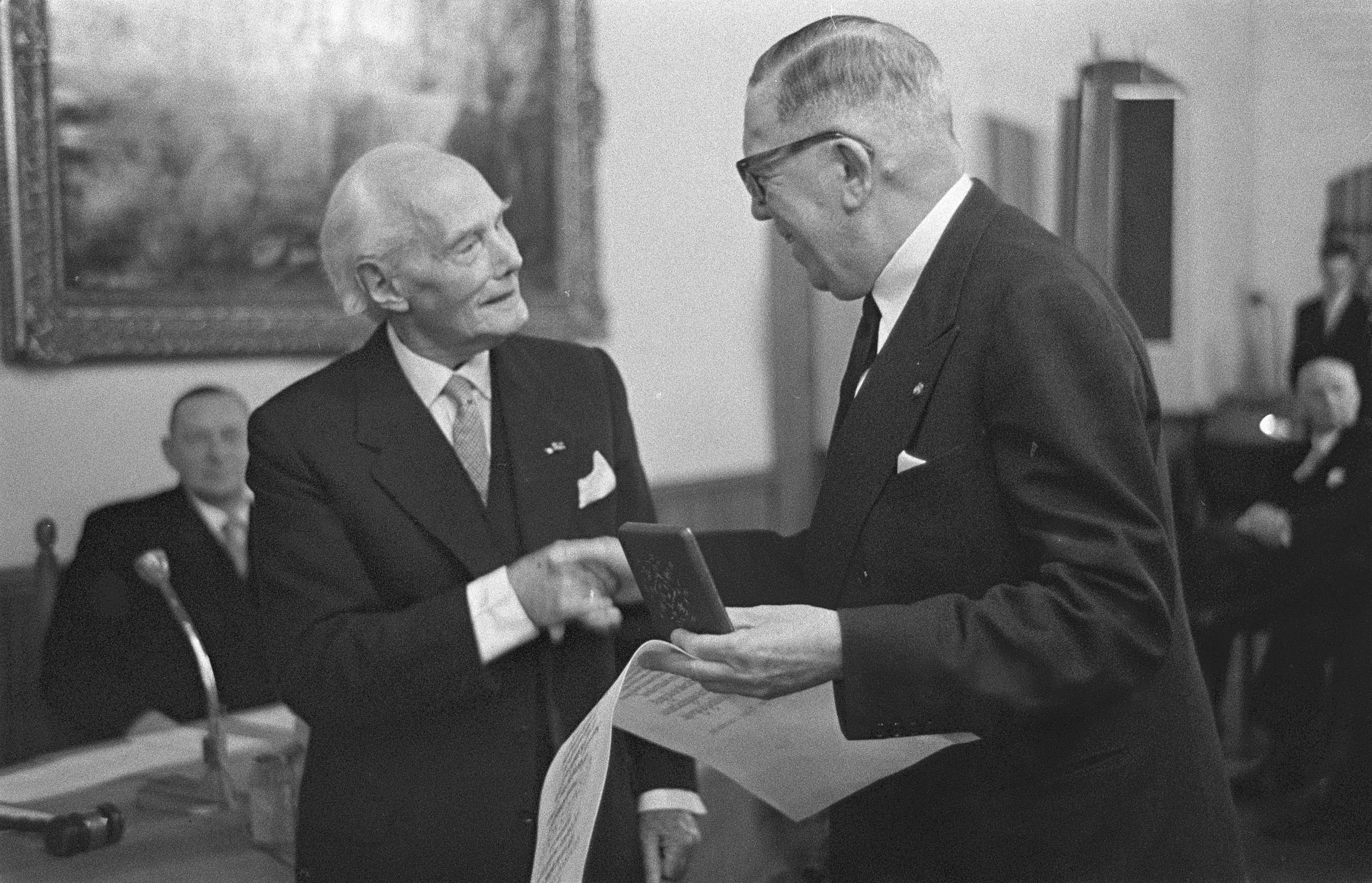 Collectie / Archief : Fotocollectie Anefo Reportage / Serie : [ onbekend ] Beschrijving : Uitreiking gouden Generaal Snijders Medaille aan de heer C. Kalff voorzitter (KNvVL) rechts door dr. ir. M. H. Damme Datum : 21 december 1959 Trefwoorden : Uitreikingen, voorzitters Persoonsnaam : C. Kalff, Generaal Snijders Medaille, KNVVL Fotograaf : Pot, Harry / Anefo Auteursrechthebbende : Nationaal Archief Materiaalsoort : Negatief (zwart/wit) Nummer archiefinventaris : bekijk toegang 2.24.01.05 Bestanddeelnummer : 910-8910